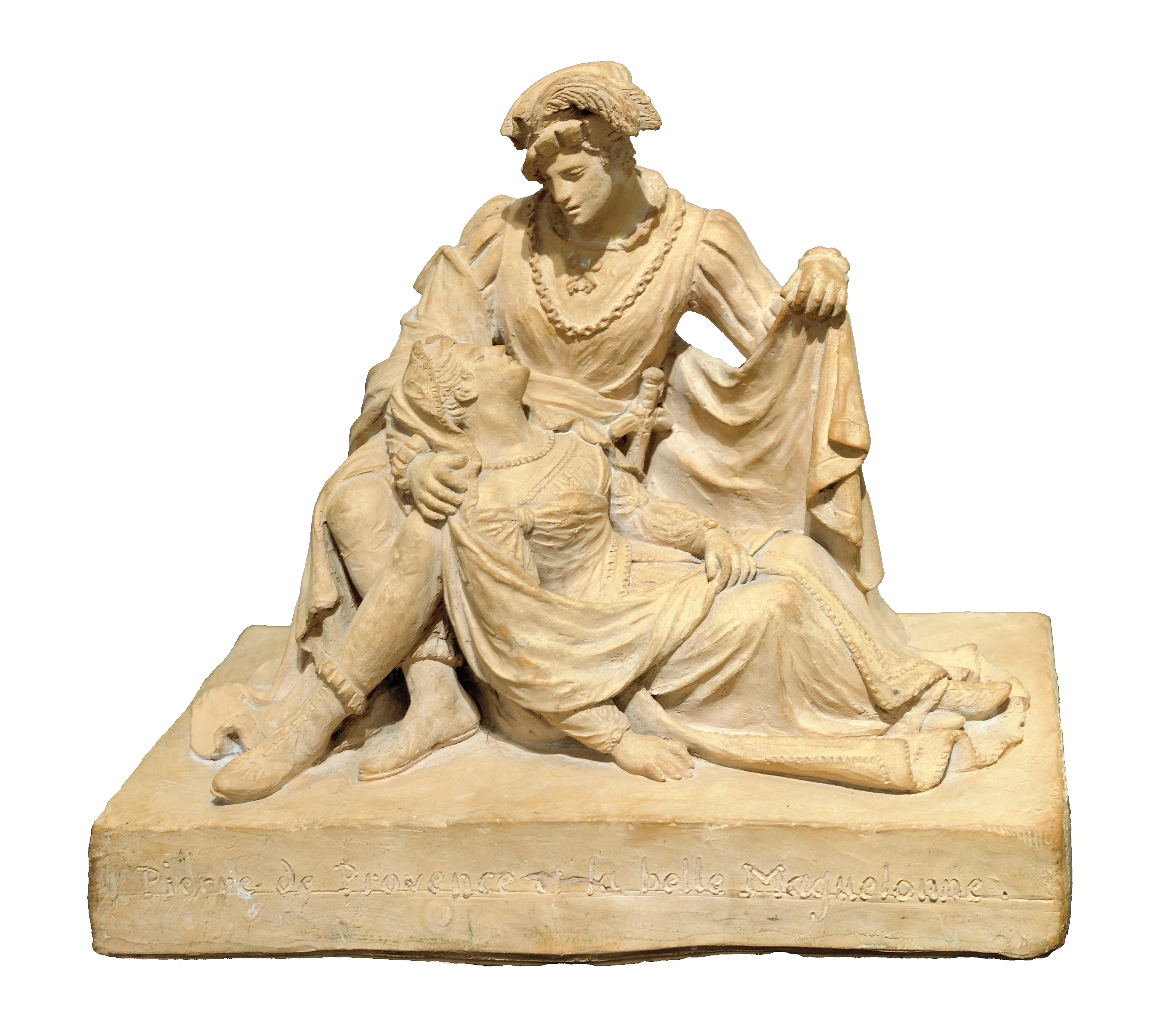 Pierre de Provence et la belle Maguelonne par Clémence Sophie de SERMEZY (1767-1850), œuvre exposée au Musée des beaux-arts de Lyon en 2014.